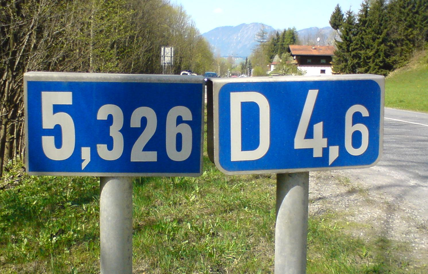 Kilometerangaben: 5,326 = neu-endend / D 4,6 = alt-beginnend